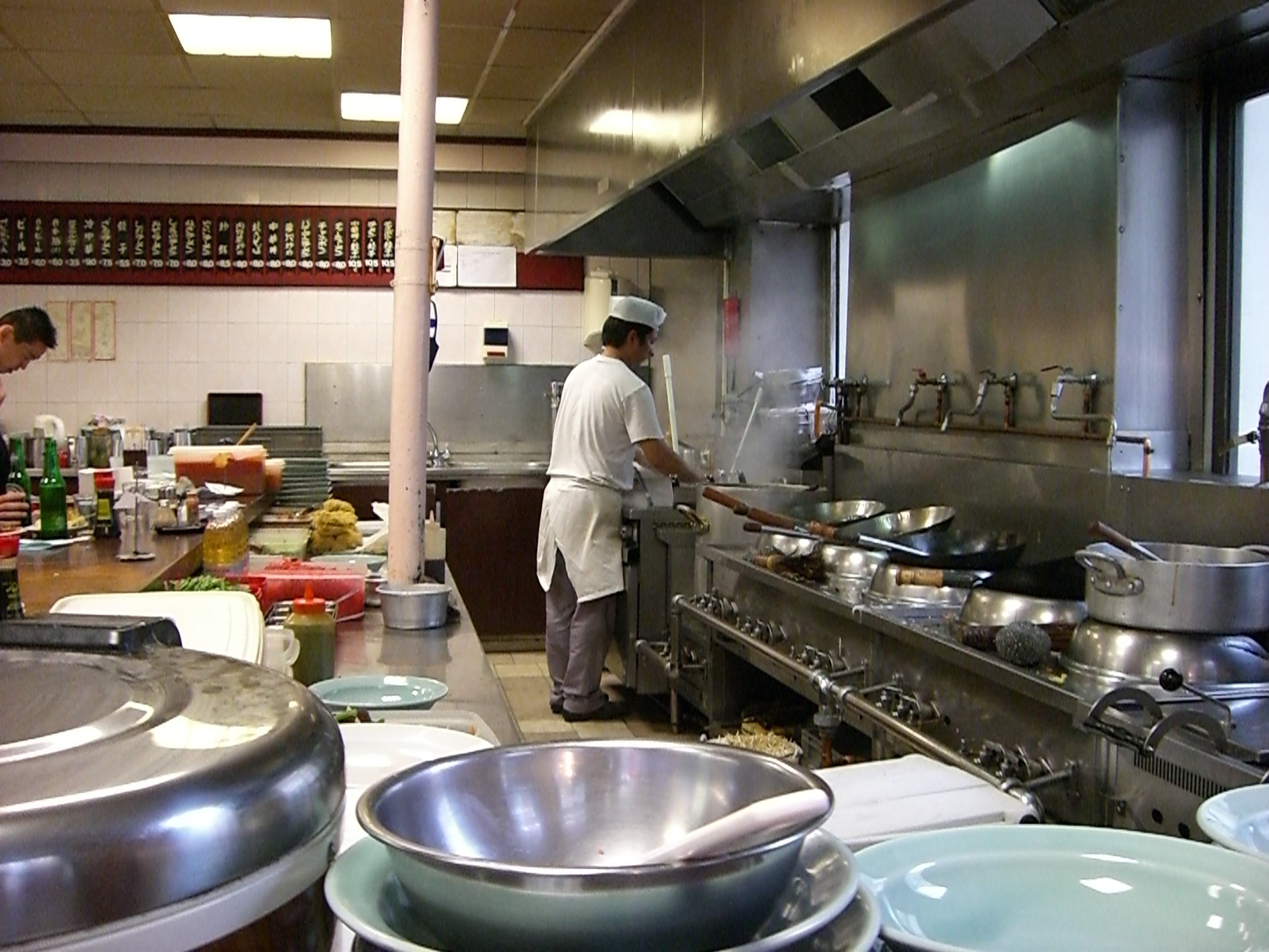 ラーメン屋店内（フランス パリのラーメン・レストラン「Higuma ひぐま」）